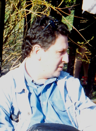 закулисная съемка